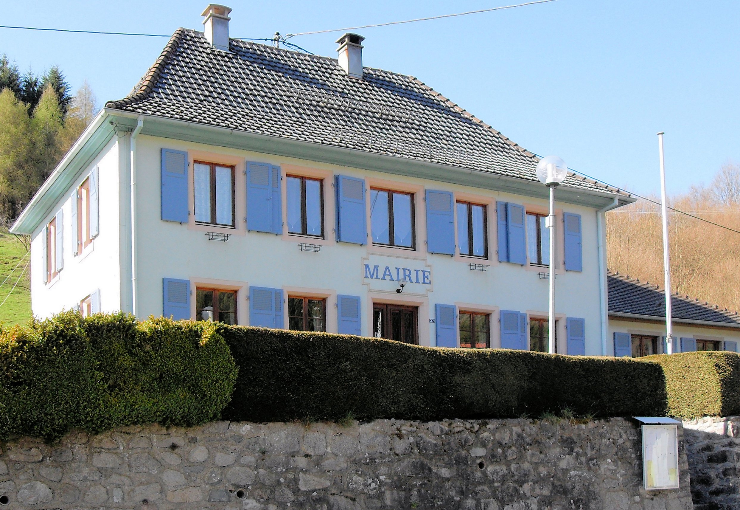 La mairie de Rimbach-près-Masevaux